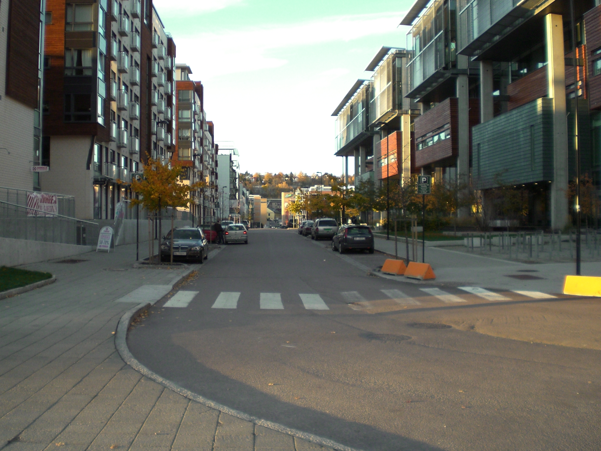 Nydalen Allé, en gate i Nydalen, Oslo. Til høyre er BI-bygget